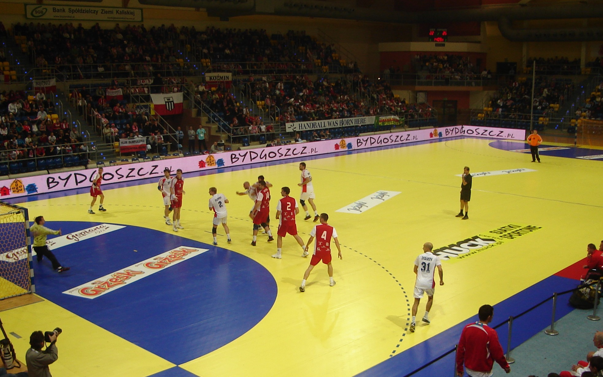 Turniej Reprezentacji Narodowych w piłce ręcznej mężczyzn 2009, mecz Rosja-Słowacja, Kalisz, Winiary Arena, 28 października 2009